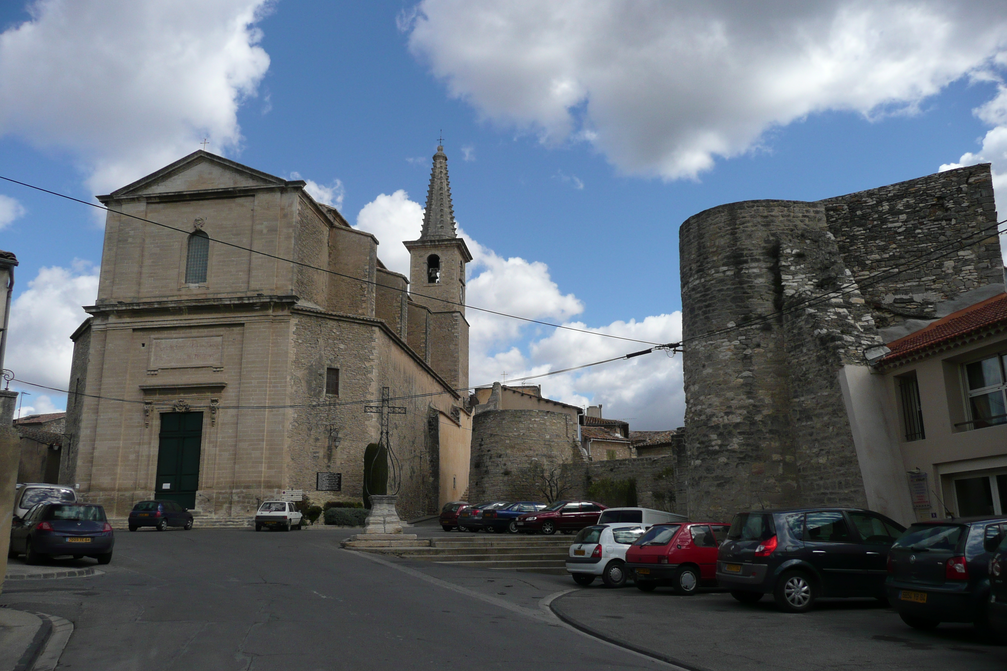 Eglise à Caumont sur Durance.